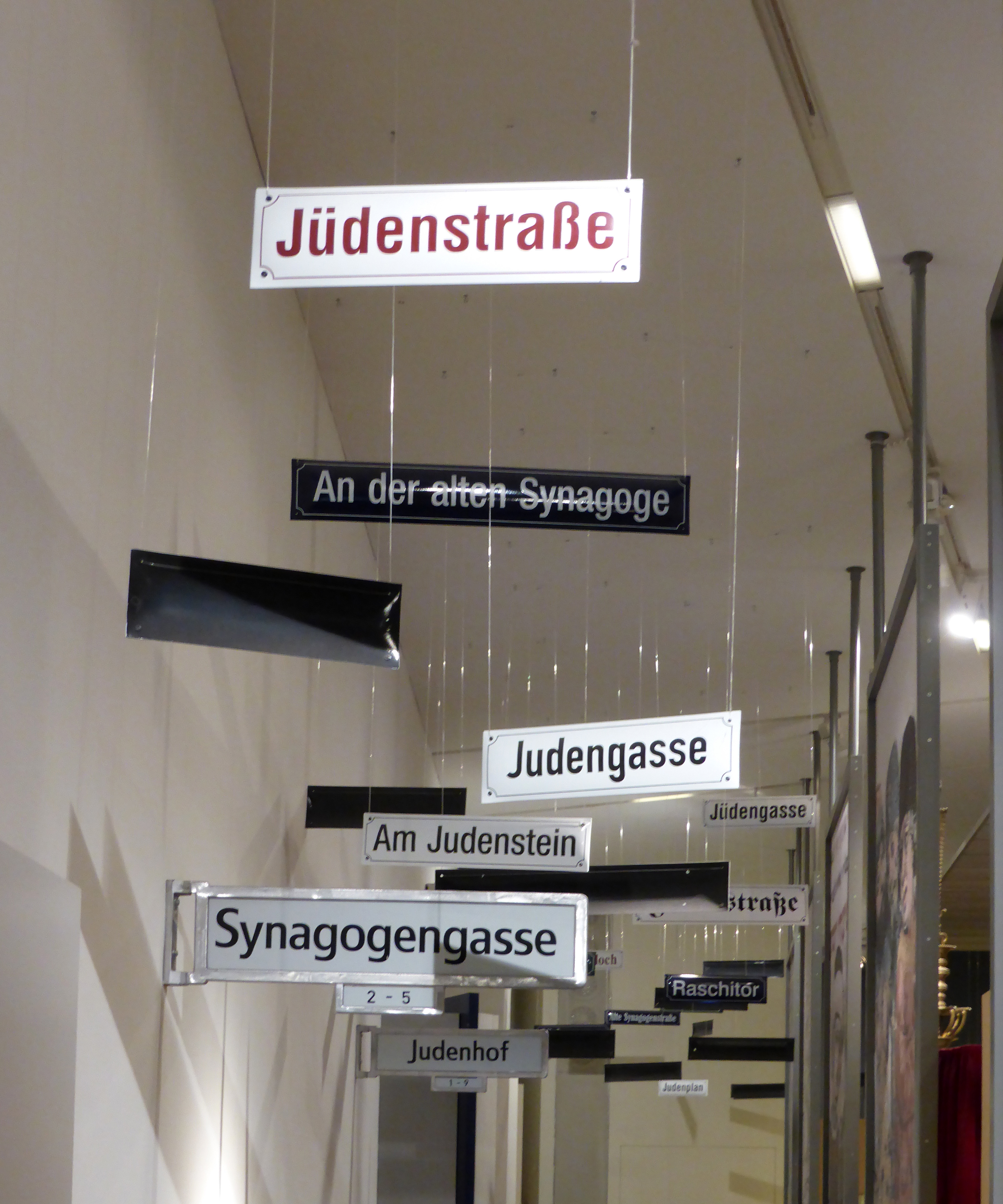 Straßenschilder, Jüdisches Museum Berlin.